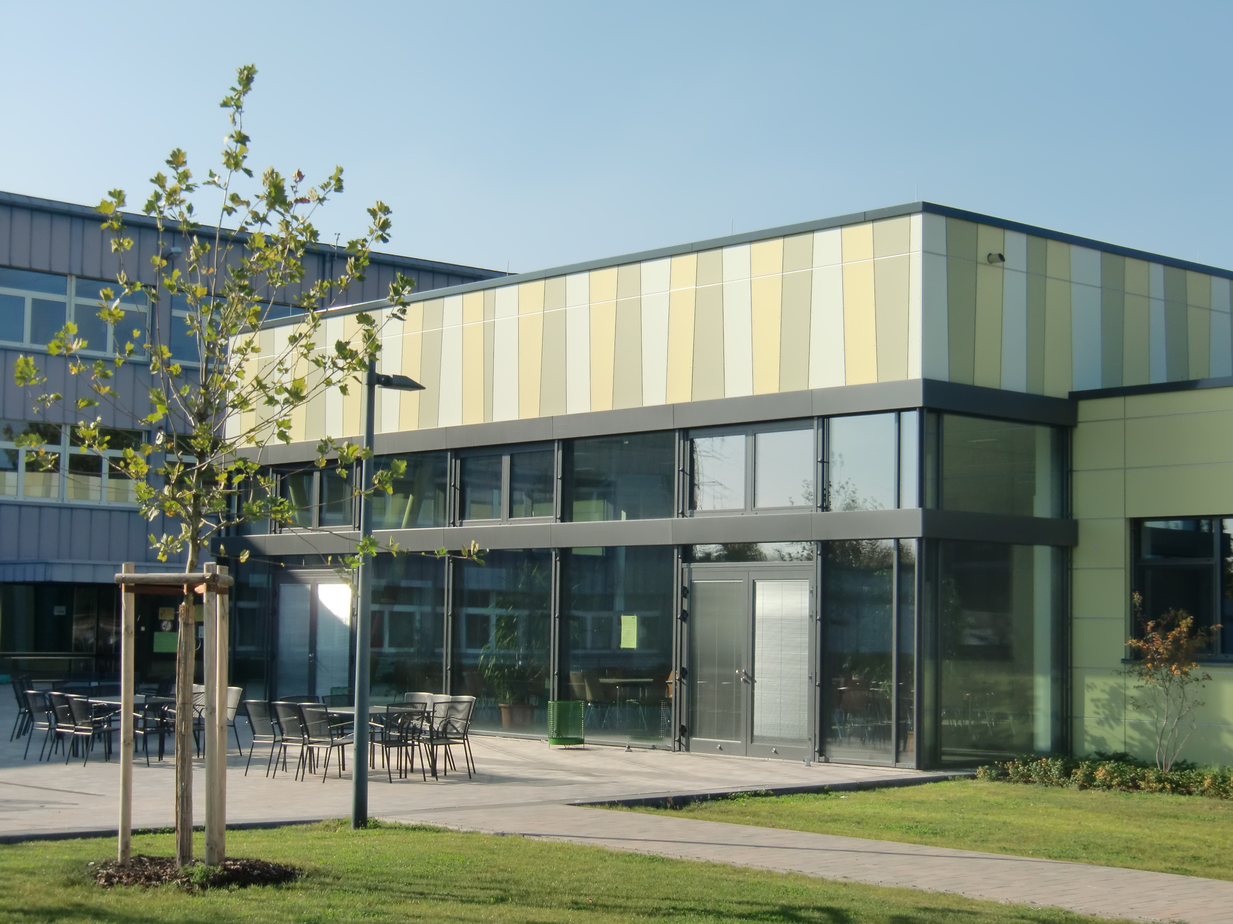 Karl Kübel Schule Bensheim